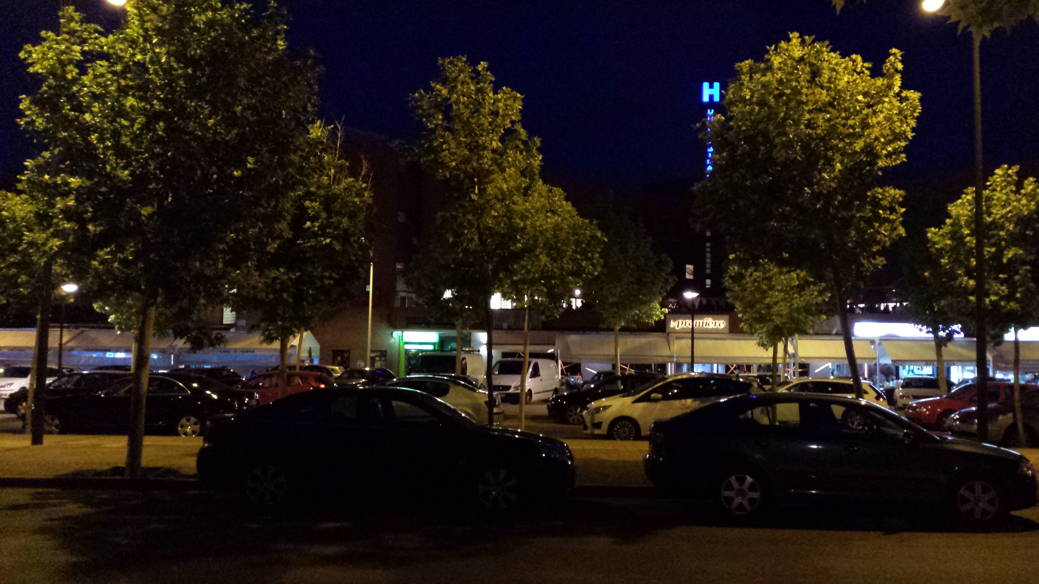 Zona Universidad. Hotel Universidad. Albacete